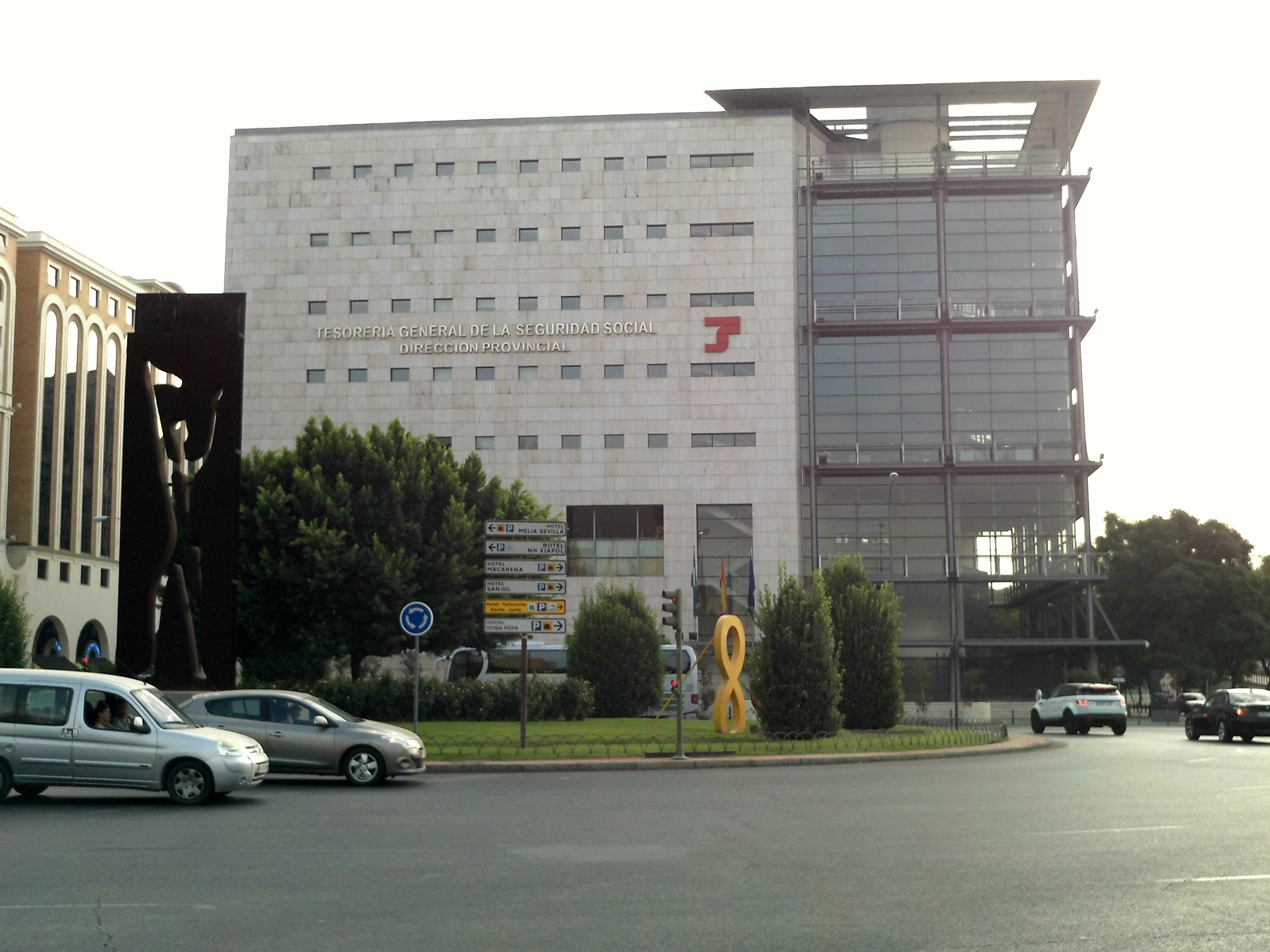 Tesorería General de la Seguridad Social. Delegación Provincial. Avenida Kansas City. Sevilla, Andalucía, España.